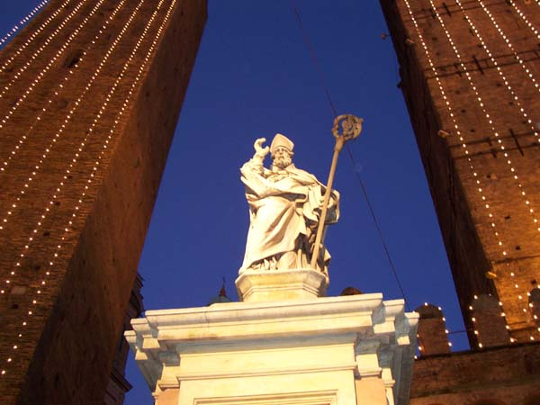 Monumento a San Petronio a Bologna, sotto le due torri, a Natale.